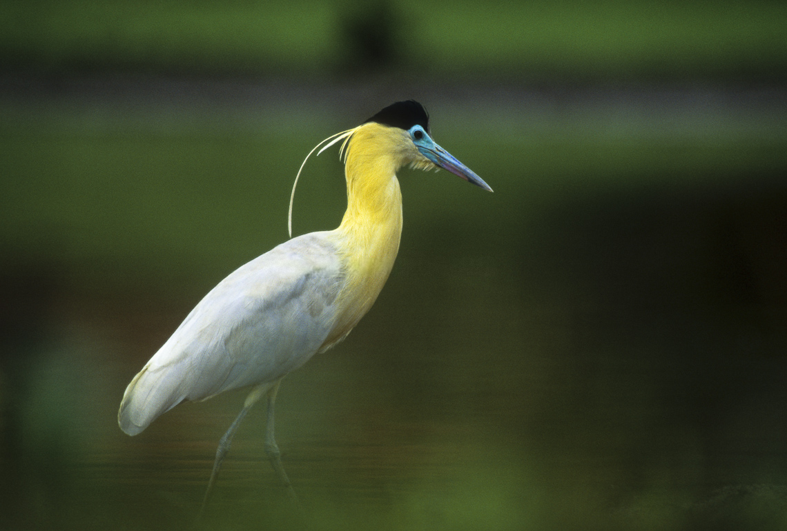 Capped Heron - Pantanal - Brazil_18